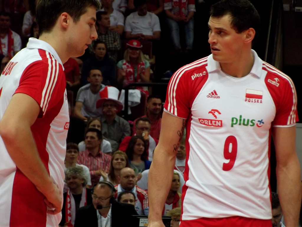 Zdjęcie zrobione podczas zawodów Ligi Światowej 2012 w katowickim Spodku.